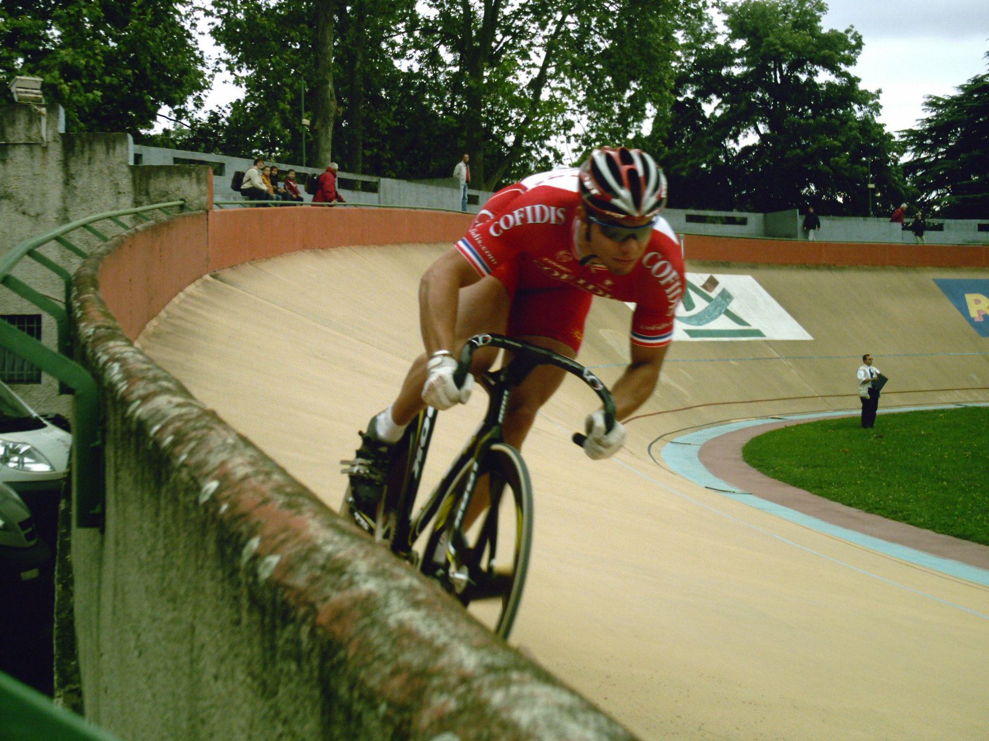 Kévin Sireau durante la fase de aceleración de los 200 metros